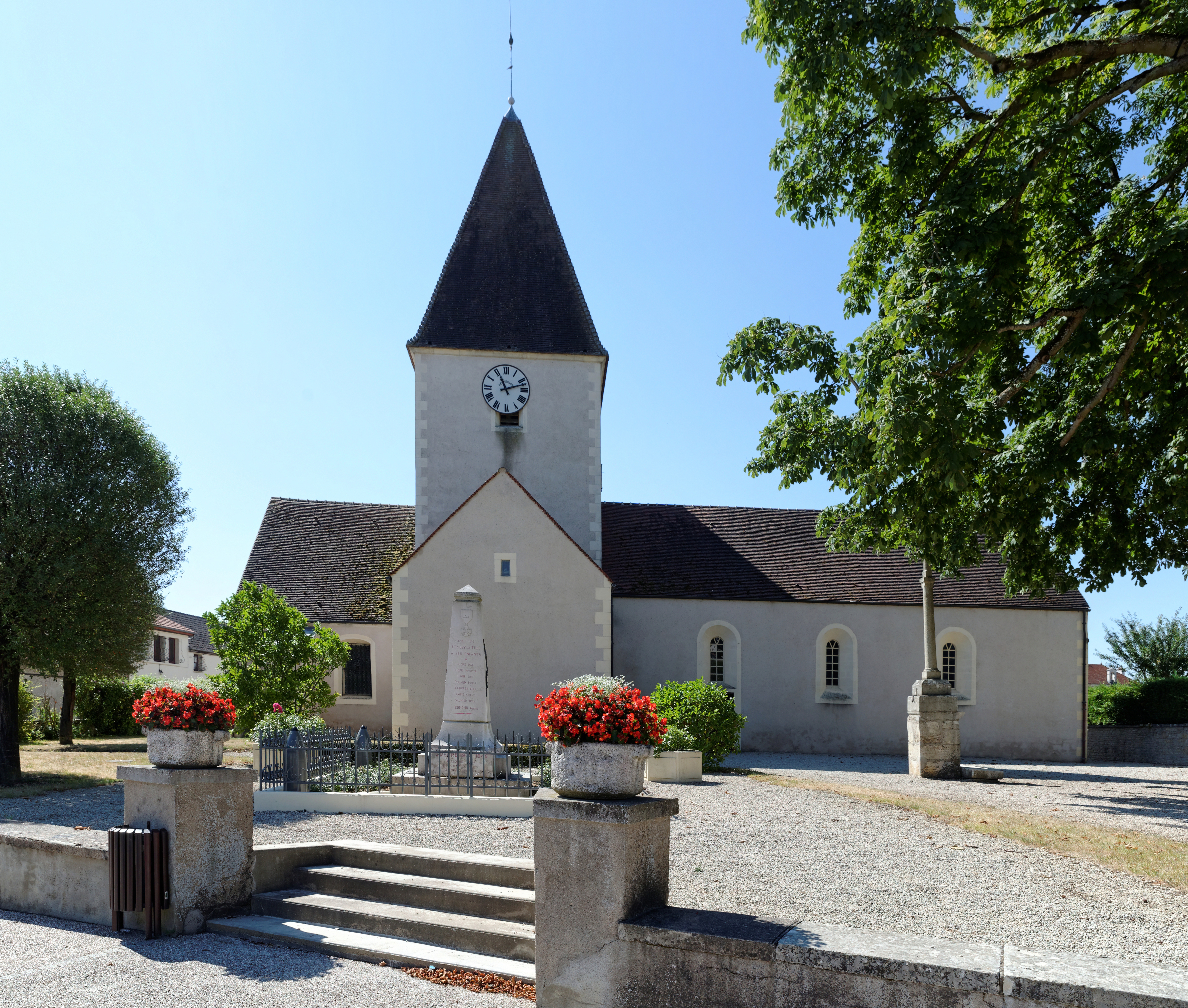 Église de Cessey-sur-Tille. (Côte d'Or, Bourgogne, France)